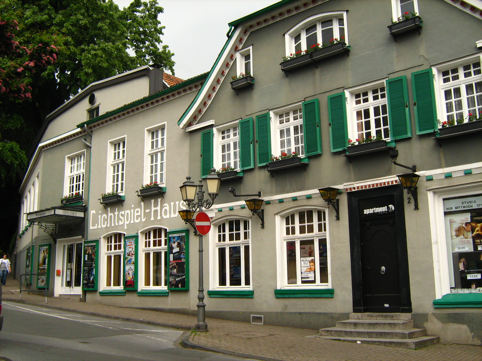 Das „Weltspiegel-Kinocenter“ in Mettmann, Düsseldorfer Straße 2.